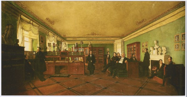 Г. Михайлов, А. Мокрицкий и другие художники школы Венецианова. Субботнее собрание у В.А. Жуковского. 1834–1836 годы. На картине изображен большой кабинет Жуковского в Шепелевском дворце.